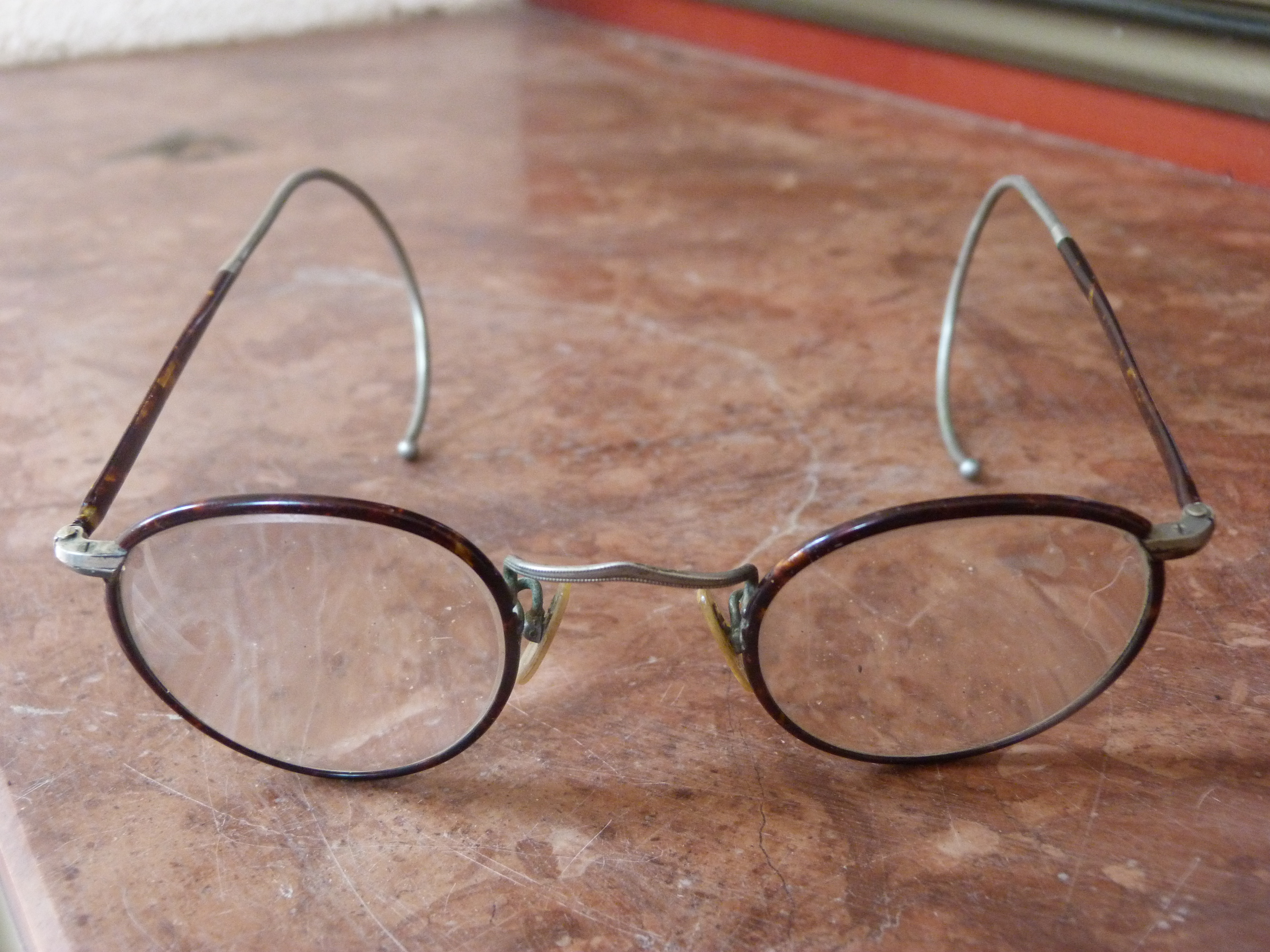 A felvétel 2015. július 24-én pénteken készült. Szemüveg. ©© Derzsi Elekes Andor, Budapest, 2015, A fénykép másolását és felhasználását a szerző ellenérték nélkül megengedi. Az engedély kiterjed a kereskedelmi célú hasznosításra is. Kéri azonban nevének feltüntetését a felhasználás során. A Metapolisz sorozat valamennyi képe és filmje Creative Commons alatti. kereskedelmi - for profit - célra is felhasználható. Ajánlott hivatkozás: Derzsi Elekes Andor: Metapolisz DVD line